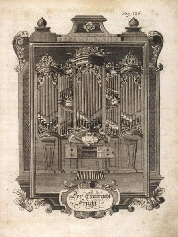 "Der Eintracht Frucht" - Kupferstich ; schwarze Druckfarbe ; 195 x 145 mm. - Original. In: Sechs Bücher vom wahren Christenthum / Arndt, Johann. - Züllichau, 1736. - S. 826/827 URL